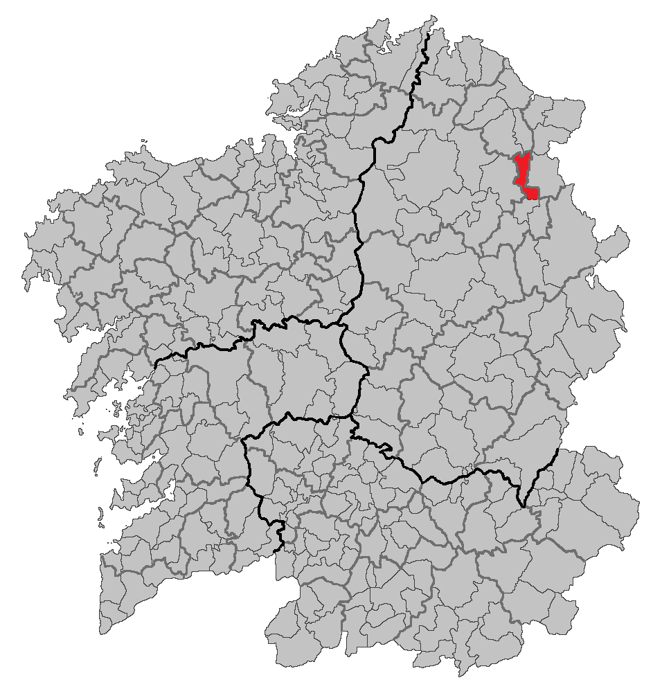 Mapa coa localización do concello de Riotorto.